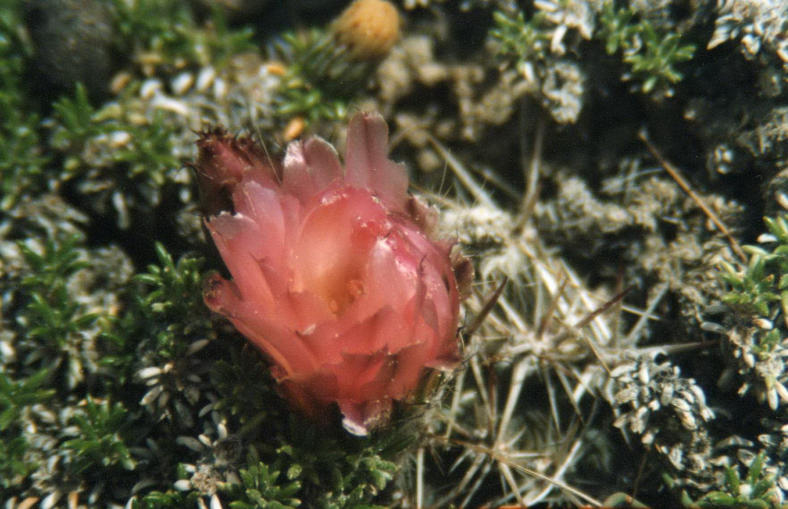 Austrocactus patagonicus